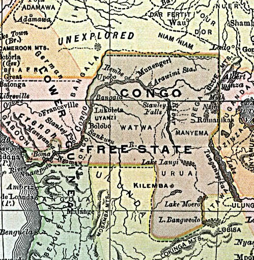 Transformé depuis Wikipedia commons, de version NL